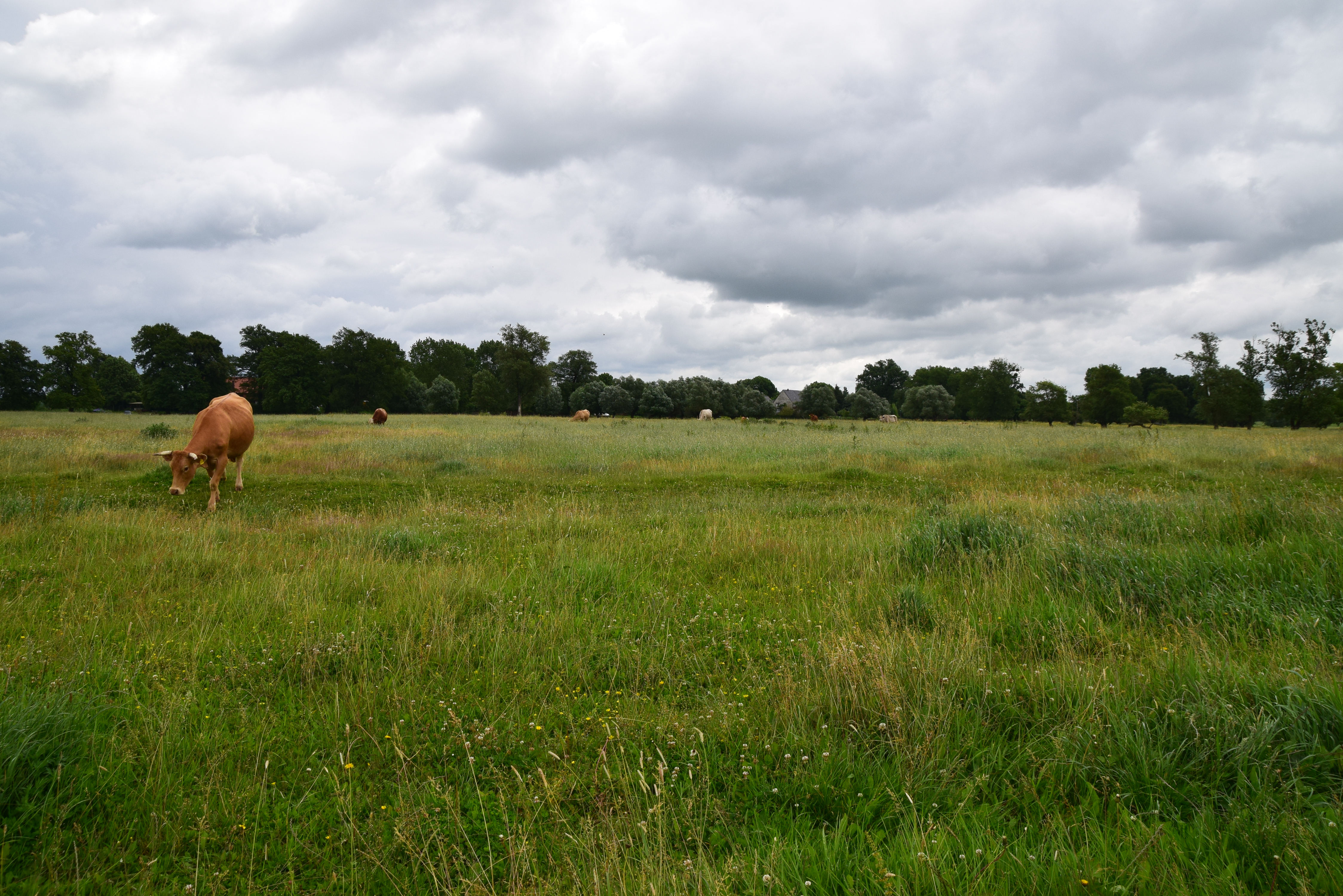 Elbwiesen im Naturschutzgebiet „Aland-Elbe-Niederung“ (NSG Nr. 388), Sachsen-Anhalt